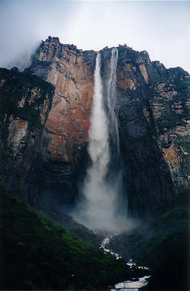 Salto Angel (Angel Falls), official name: Kerepakupai merú